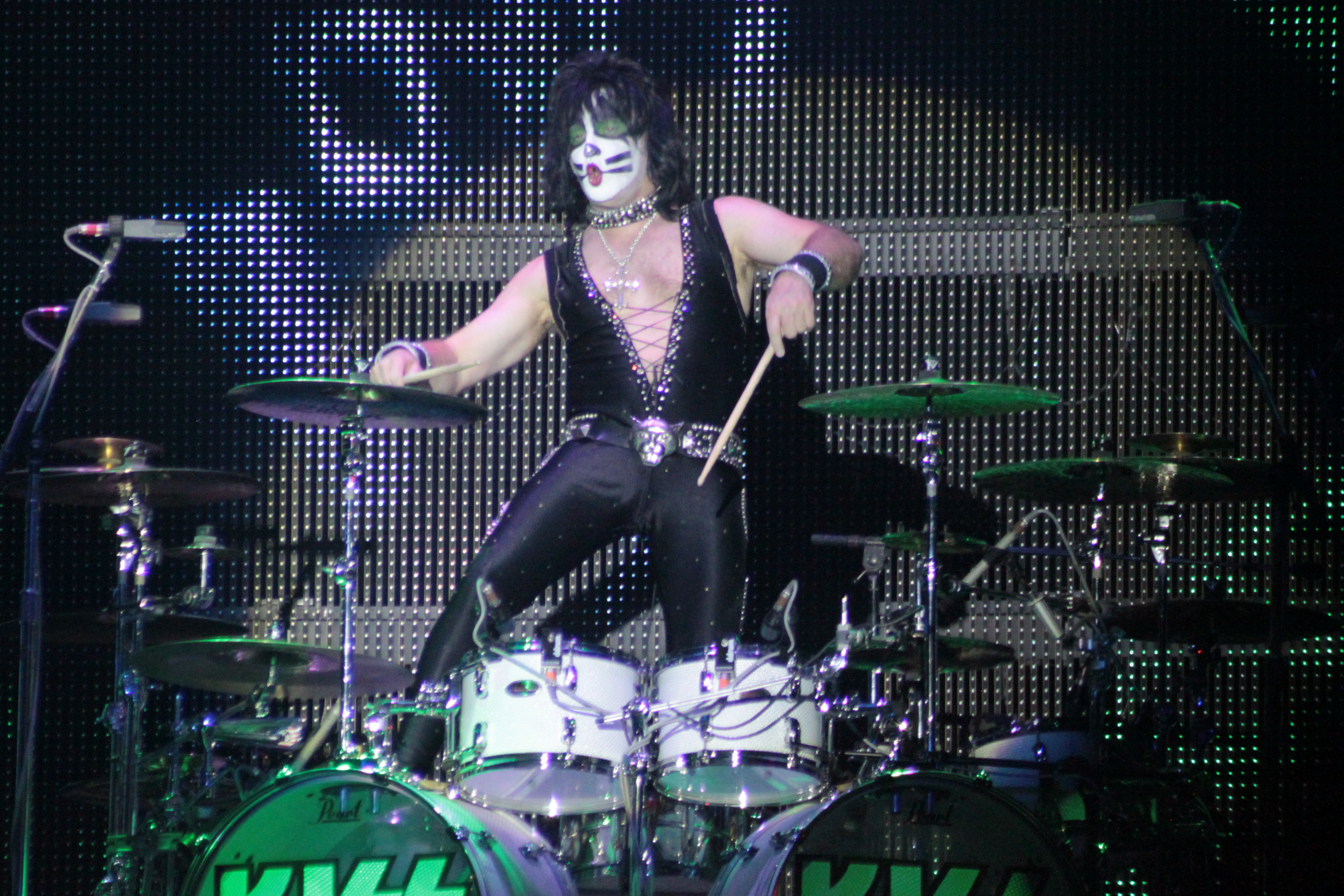 Eric Singer, Kiss, Helfest 2013, Fr-44-Clisson.